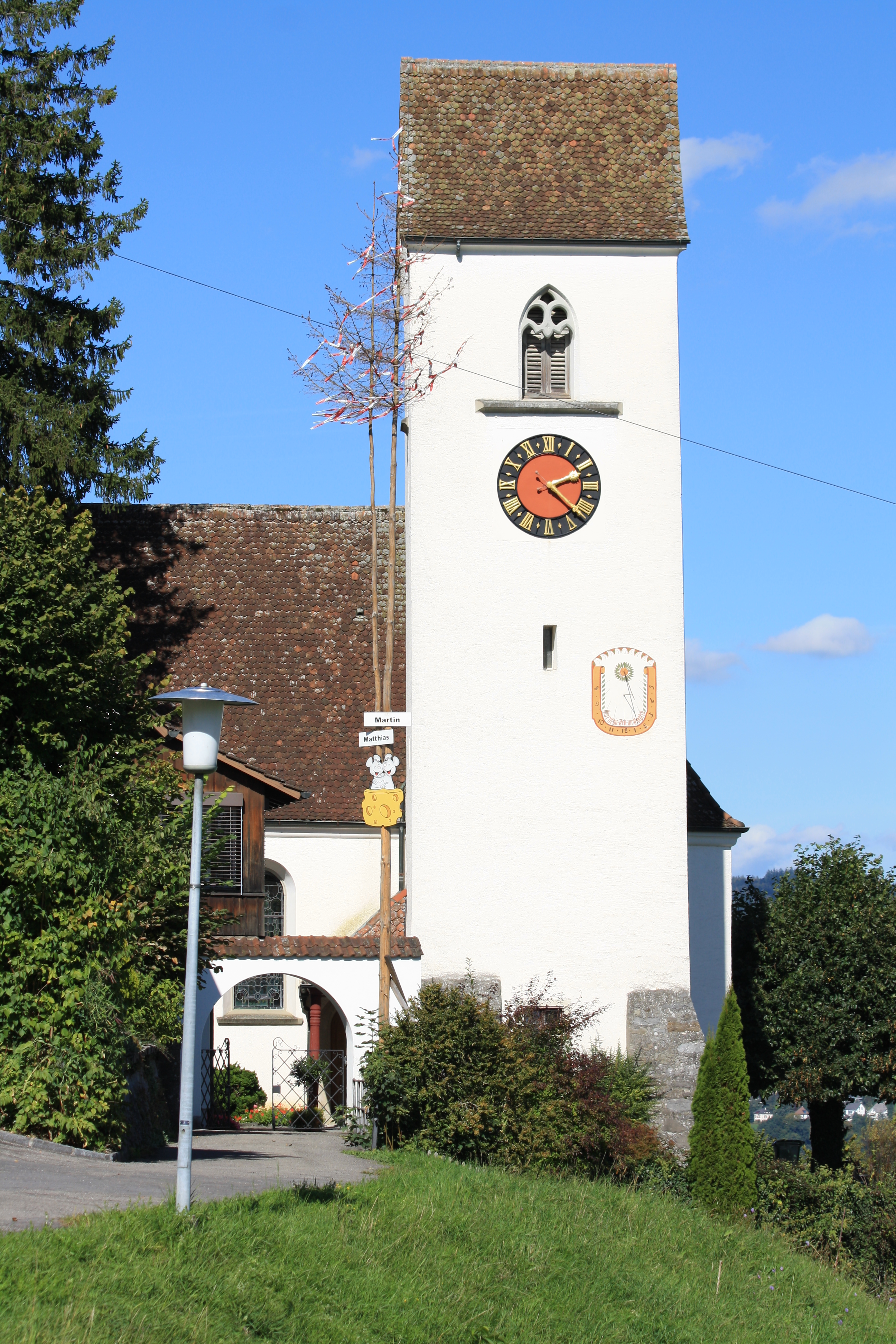 Reformierte Kirche Birrwil